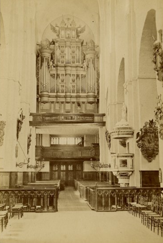 Fotografie von Carl Anton Schulz der Orgel in der Petrikirche Riga (Lettland), erbaut 1743 von Gottfried Kloosen